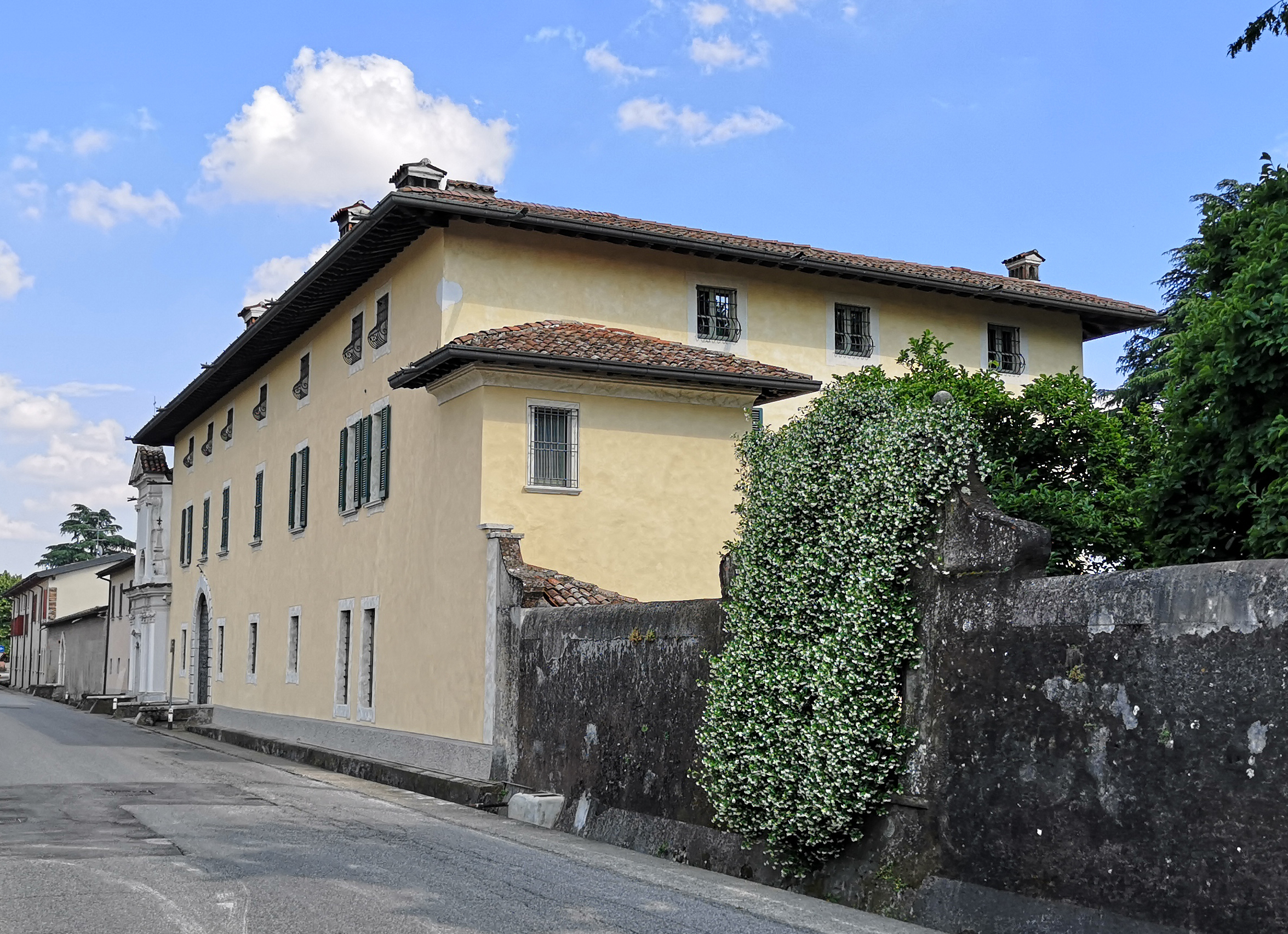 Palazzo Rampinelli, Travagliato (BS)